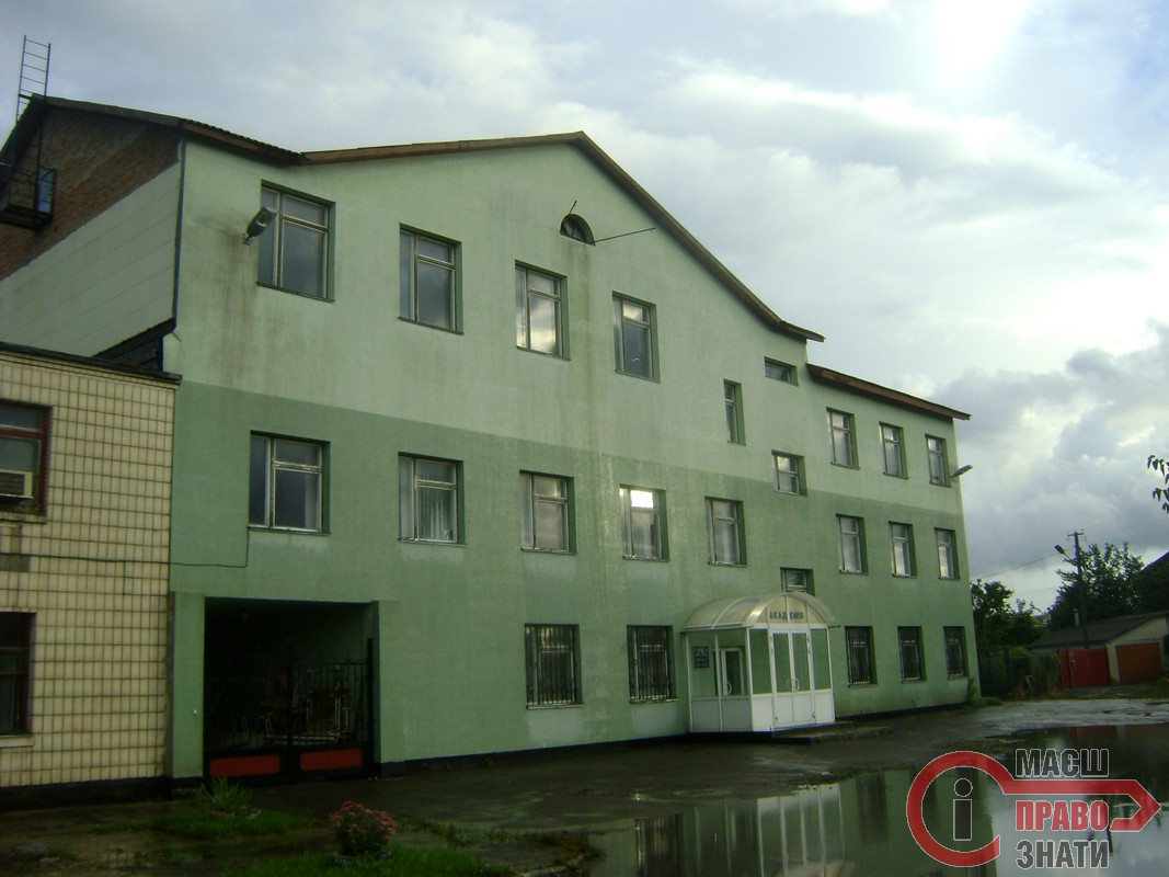 Дозволено використовувати матеріали з сайту за умови вказування оригінального авторства. [1]